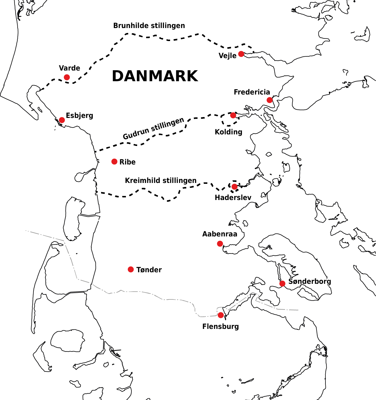 Kort over tyske forsvarsværker i Syd & Sønderjylland under anden verdenskrig. Herunder. Gudrunstillingen, Brunhildstillingen og Kriemhildstilligen